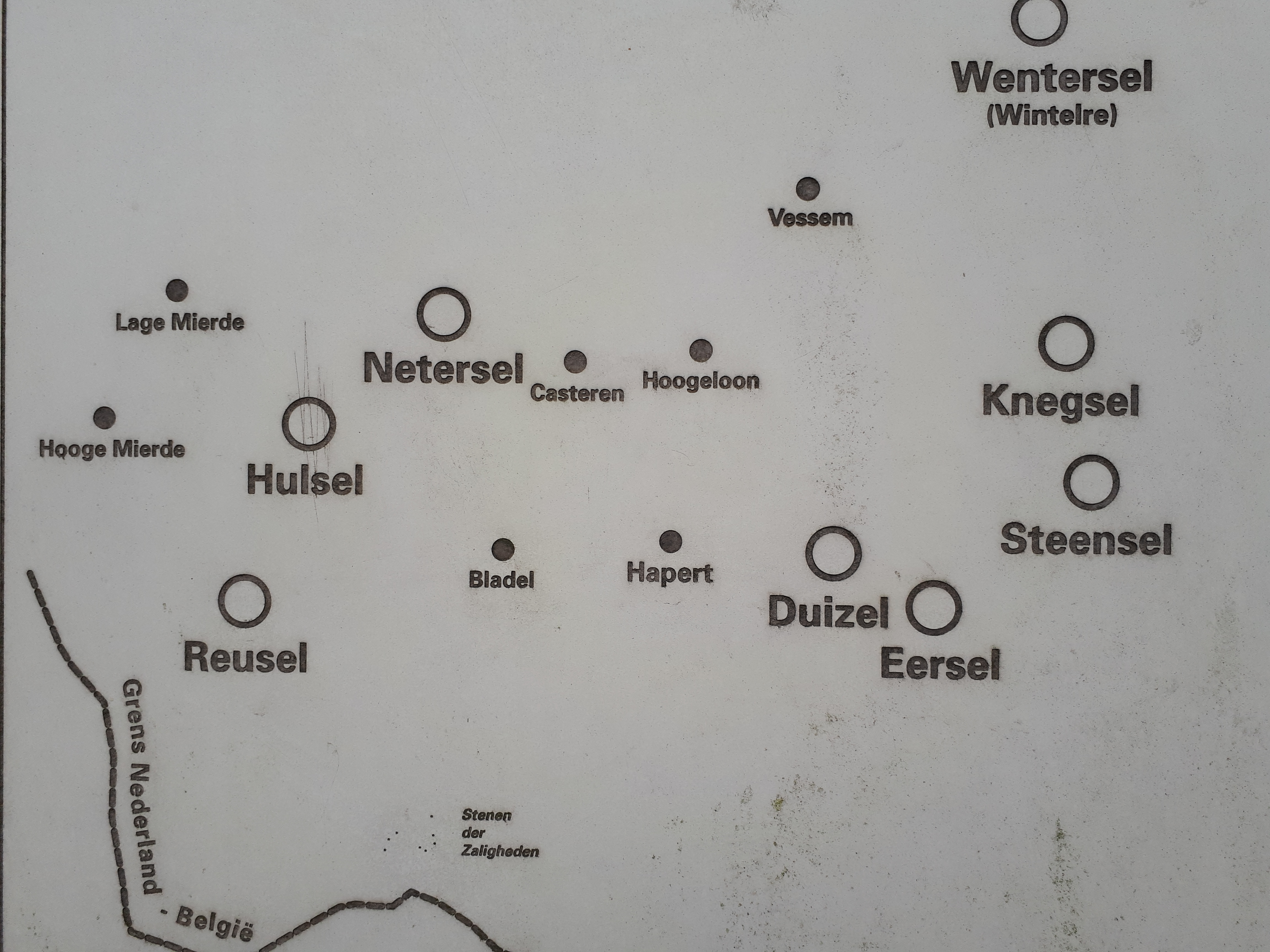 Topografische weergaven van de acht zaligheden.